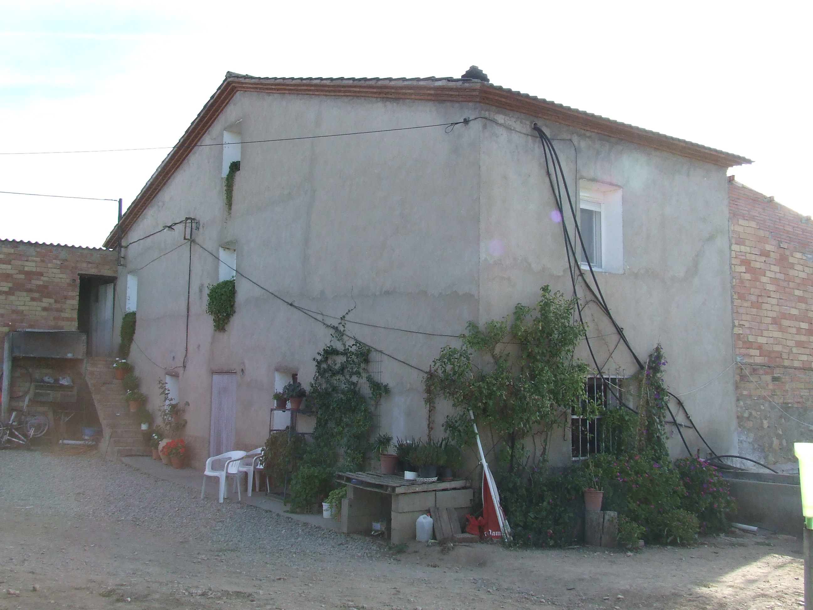 Cal Joliu (Abella de la Conca, Pallars Jussà)